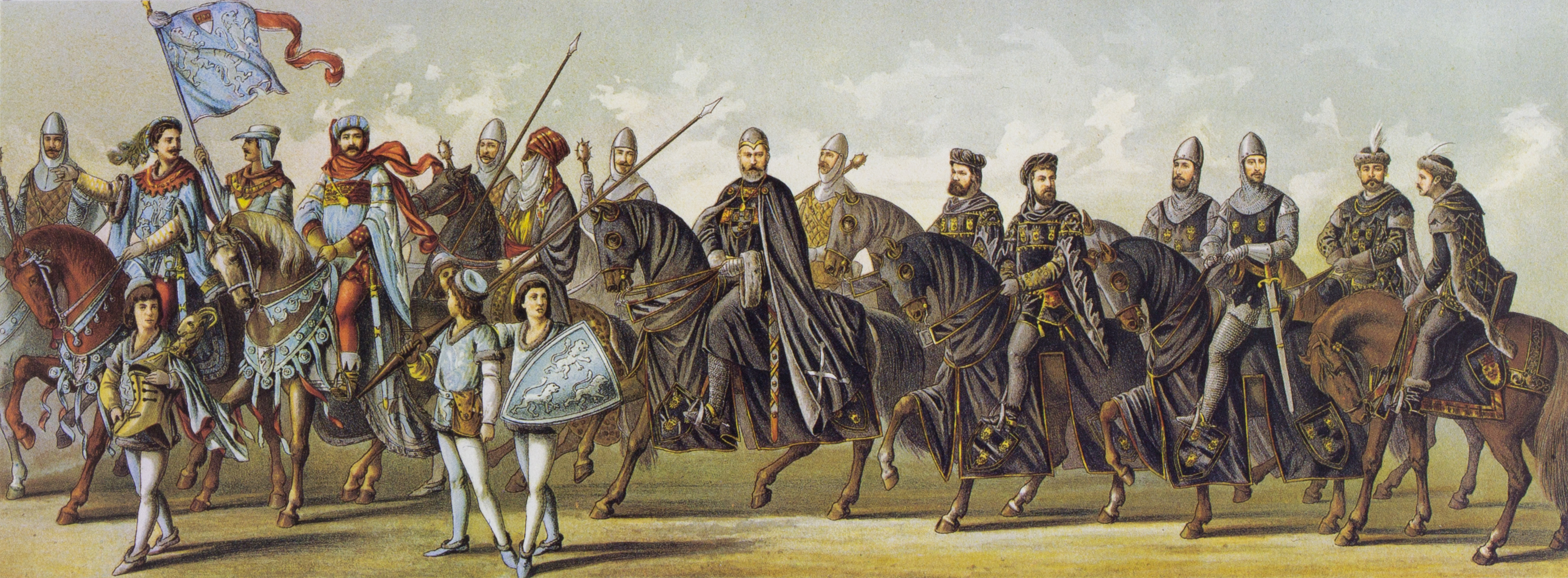 Tony Avenarius: Historischer Festzug veranstaltet bei der Feier der Vollendung des Kölner Doms am 18. October 1880. Tafel XIV